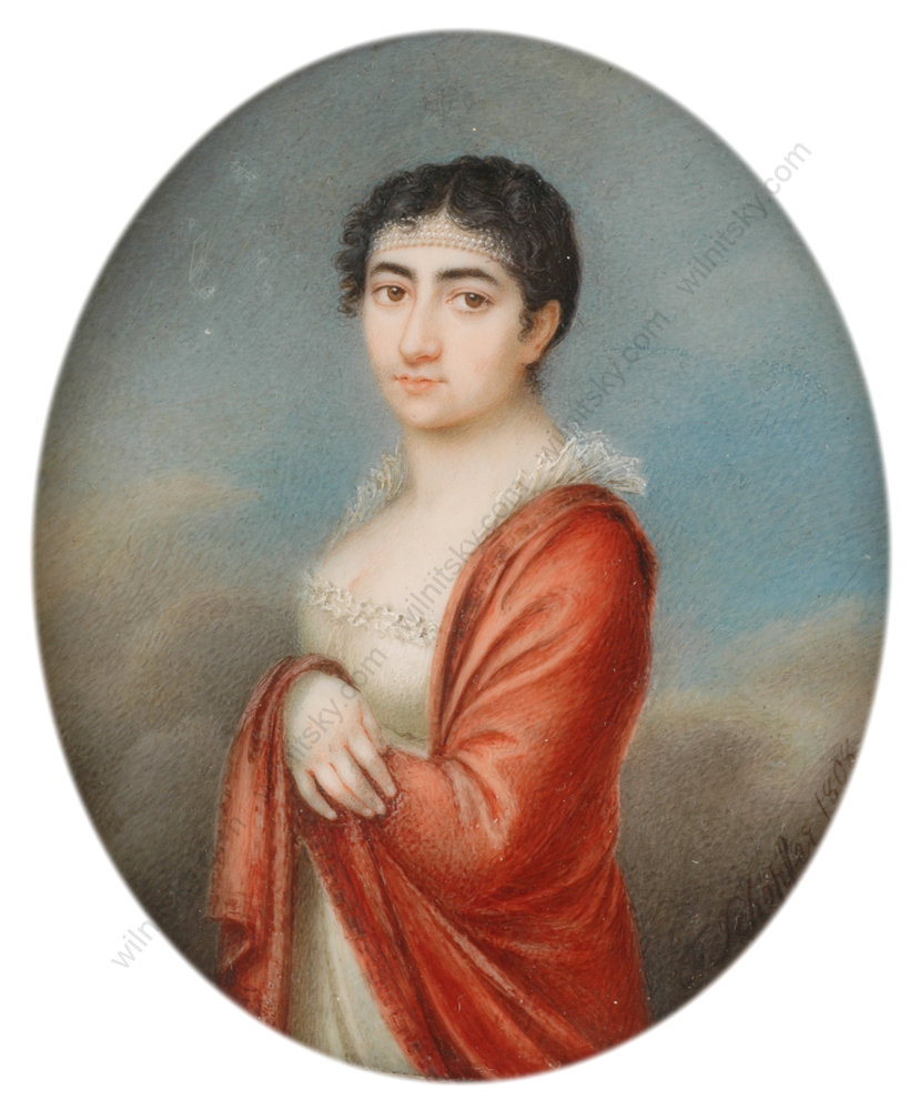 Rebeka Caroline von Eichthal (vorher Seligmann), (1788-1836), Tochter des bayerischen Hofbankiers Aron Elias von Eichthal (vorher Seligmann); gemalt von Franziska Schoepfer (1763-1836)